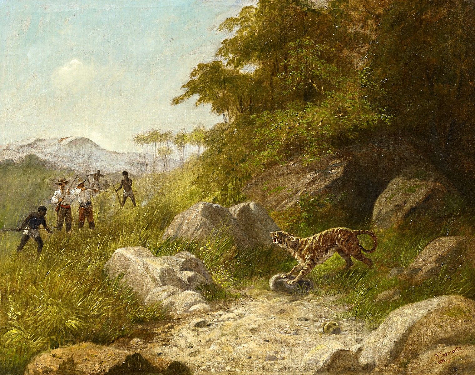 Tigerjagd